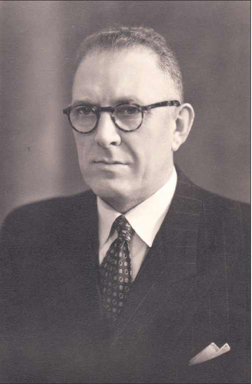 Fjalar Nordell